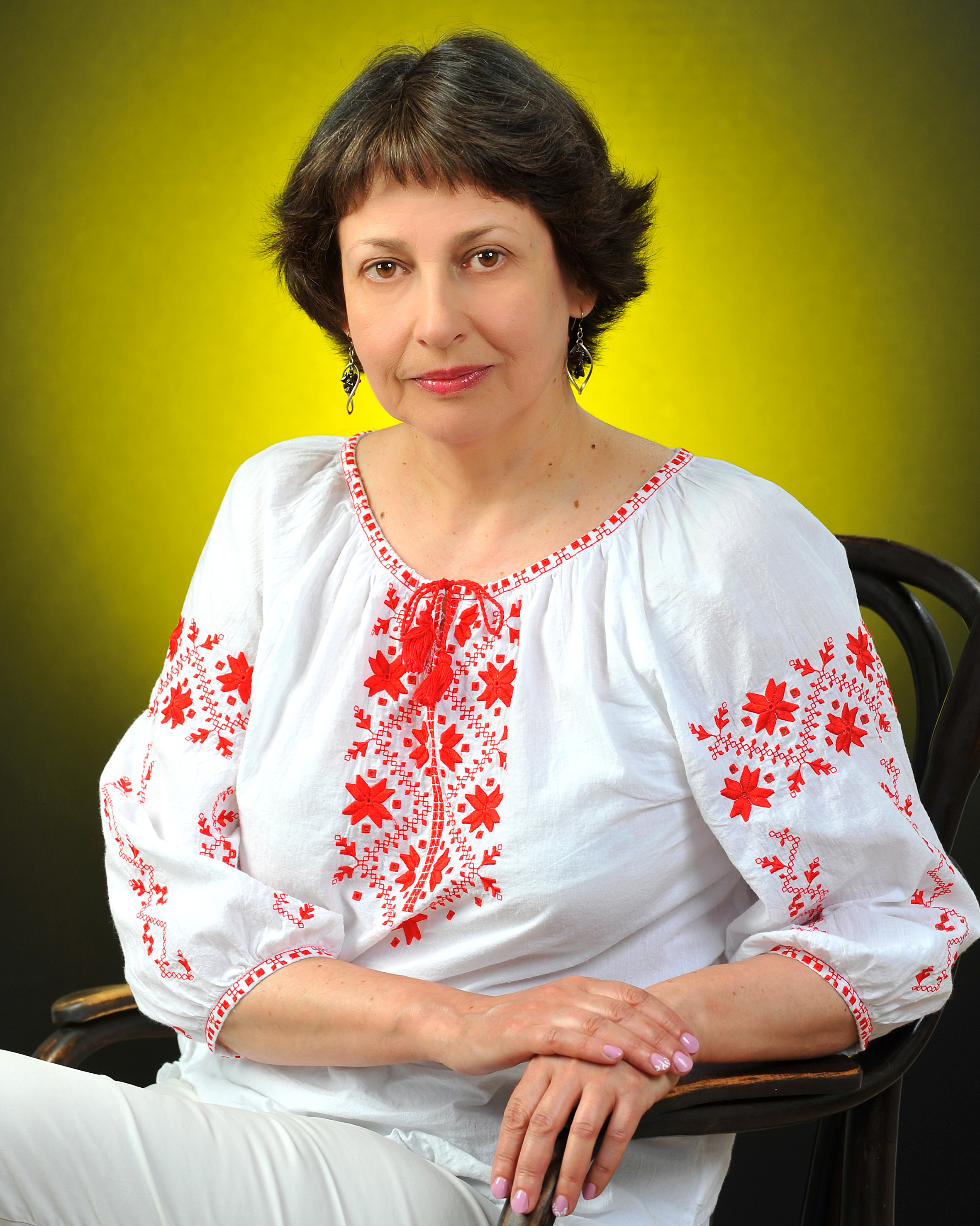 Білошицька-Костюкевич Олена Миколаївна